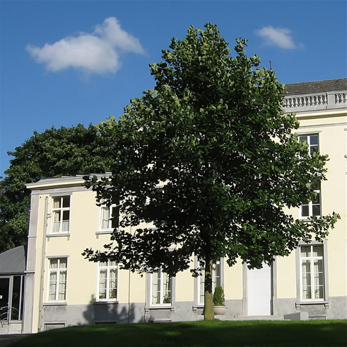 Château Paternoster à Soignies